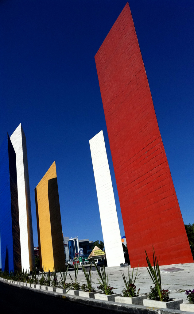 Tomé esta foto con un iPhone 4. Es increíble lo bien que quedo. Las Torres de Satélite son un elemento emblemático de cd. Satélite y fueron diseñadas por Mathias Göritz y construidas por Luis Barragan.